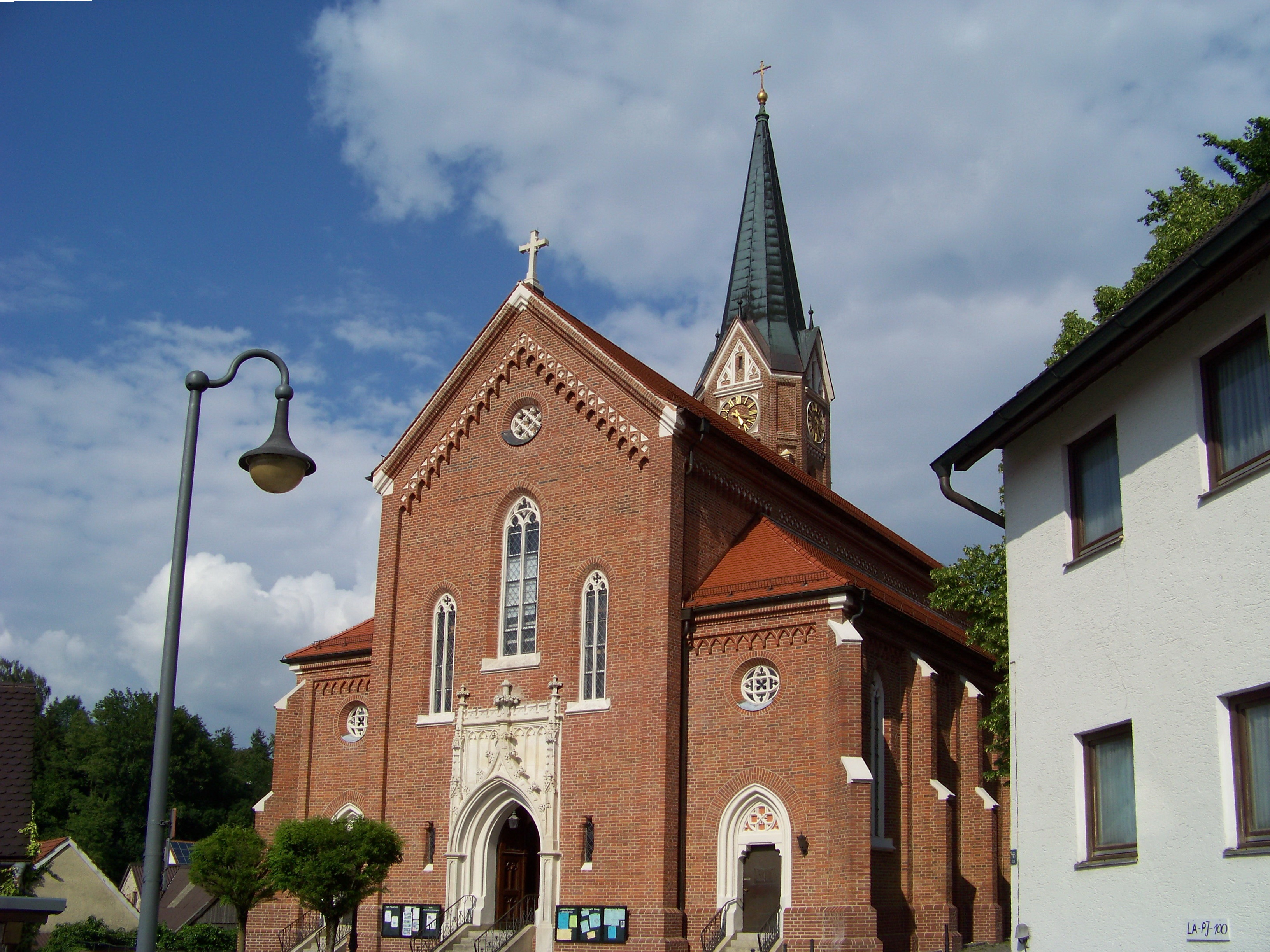 Rottenburg an der Laaber. Katholische Pfarrkirche St. Georg, Blankziegelbau 1868/69 von Leonhard Schmidtner; mit Ausstattung.